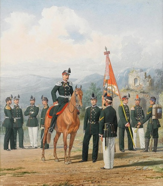 Офицеры и нижние чины 1-й Гренадёрской дивизии, у руин на Кавказе. 1864-1872 гг.